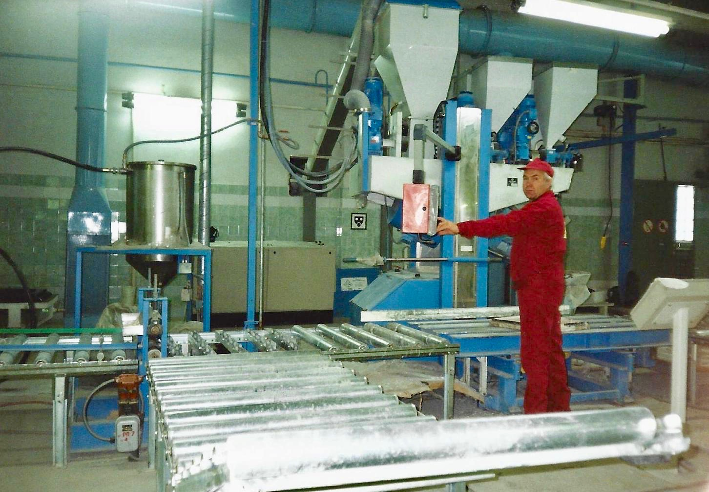 Урочисте відкриття виробничого комплексу «Полімер» з випуску виробів з полімерної бетону відбулося 16 липня 1997 року